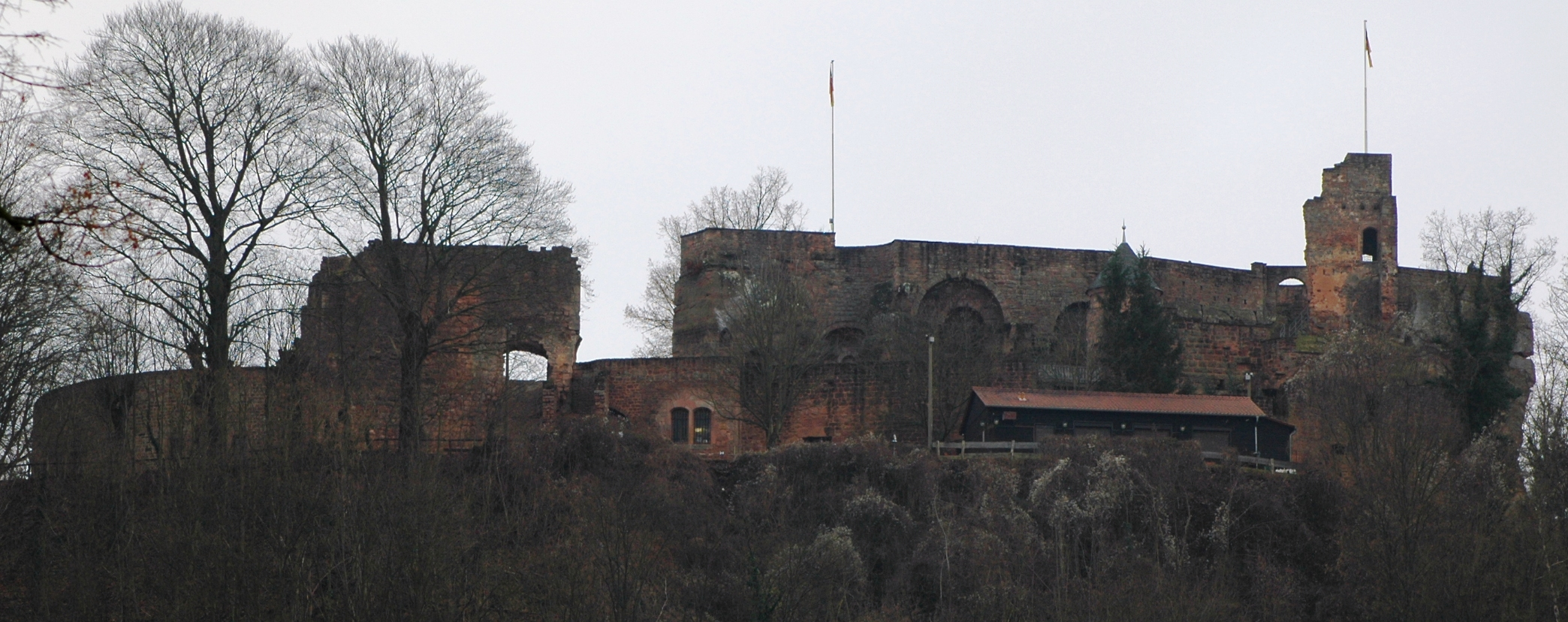 castle Nanstein